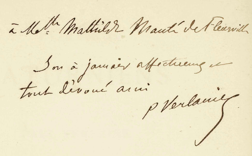 Dédicaces des Poèmes saturniens par Verlaine pour Mathilde Mauté sa future épouse (1869)